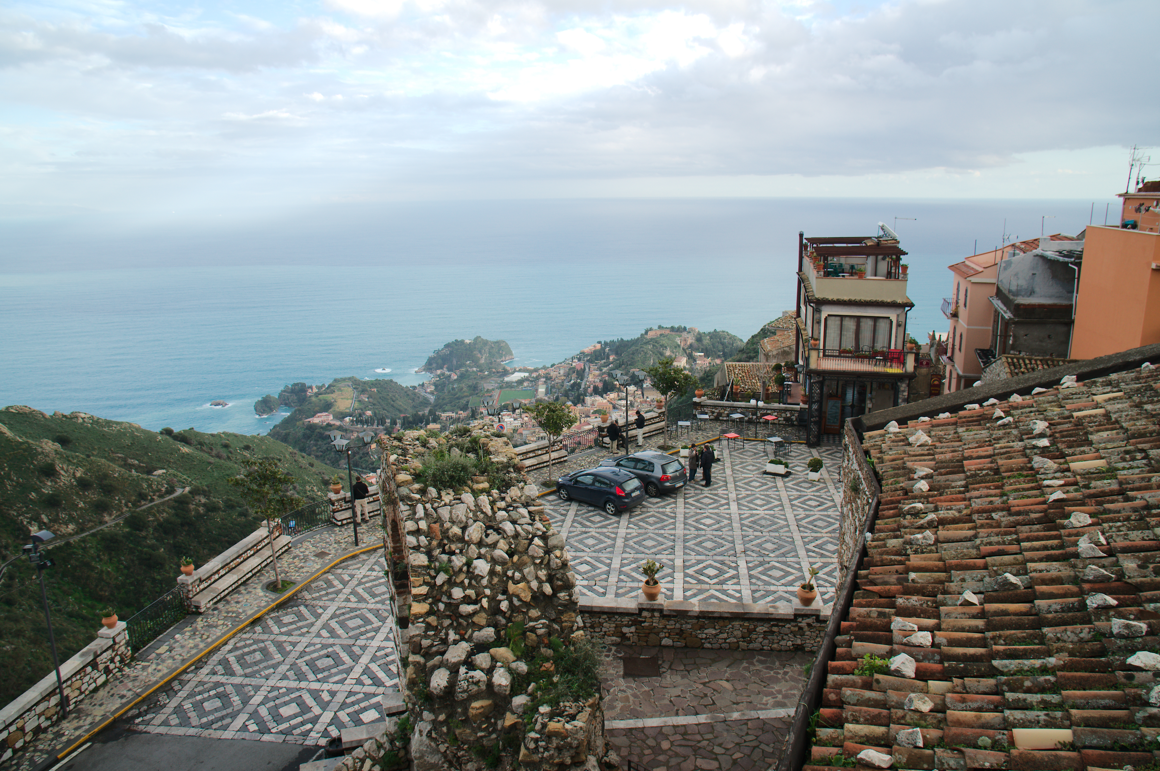 Taormina